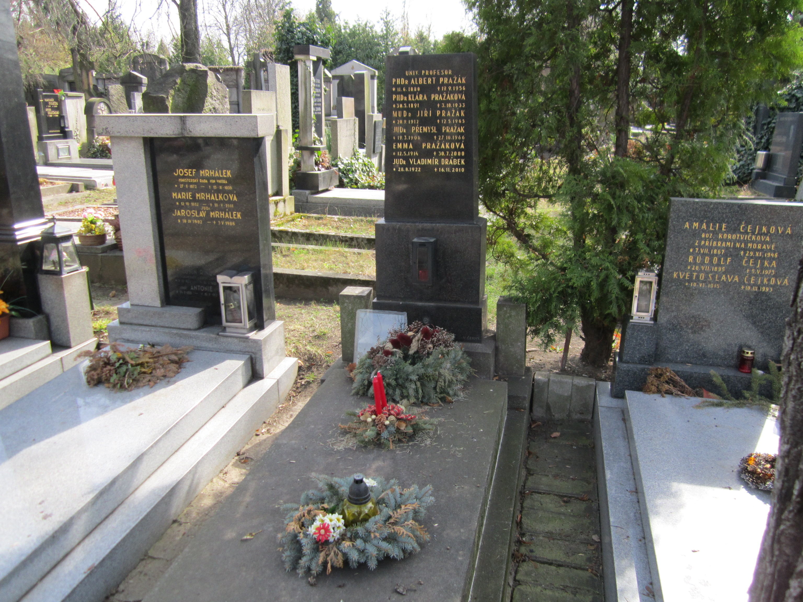 Praha - Vinohrady, hřbitov, Albert Pražák, Klára Pražáková, Přemysl Pražák, Jiří Pražák, Vladimír Drábek, Emma Pražáková, 2012